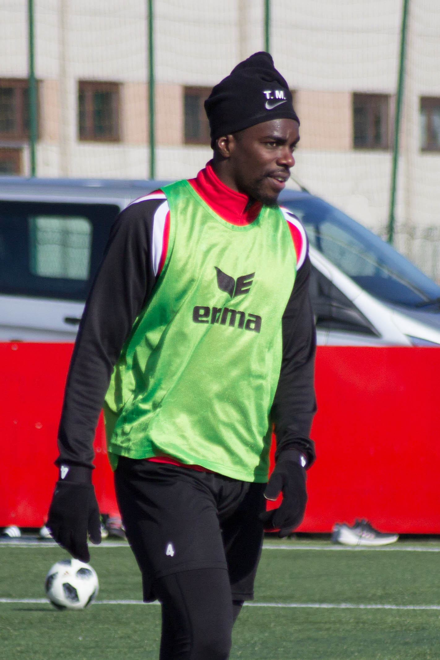 Entraînement du Royal Excel Mouscron, au Futurosport( Mouscron). Le 22 février 2018.